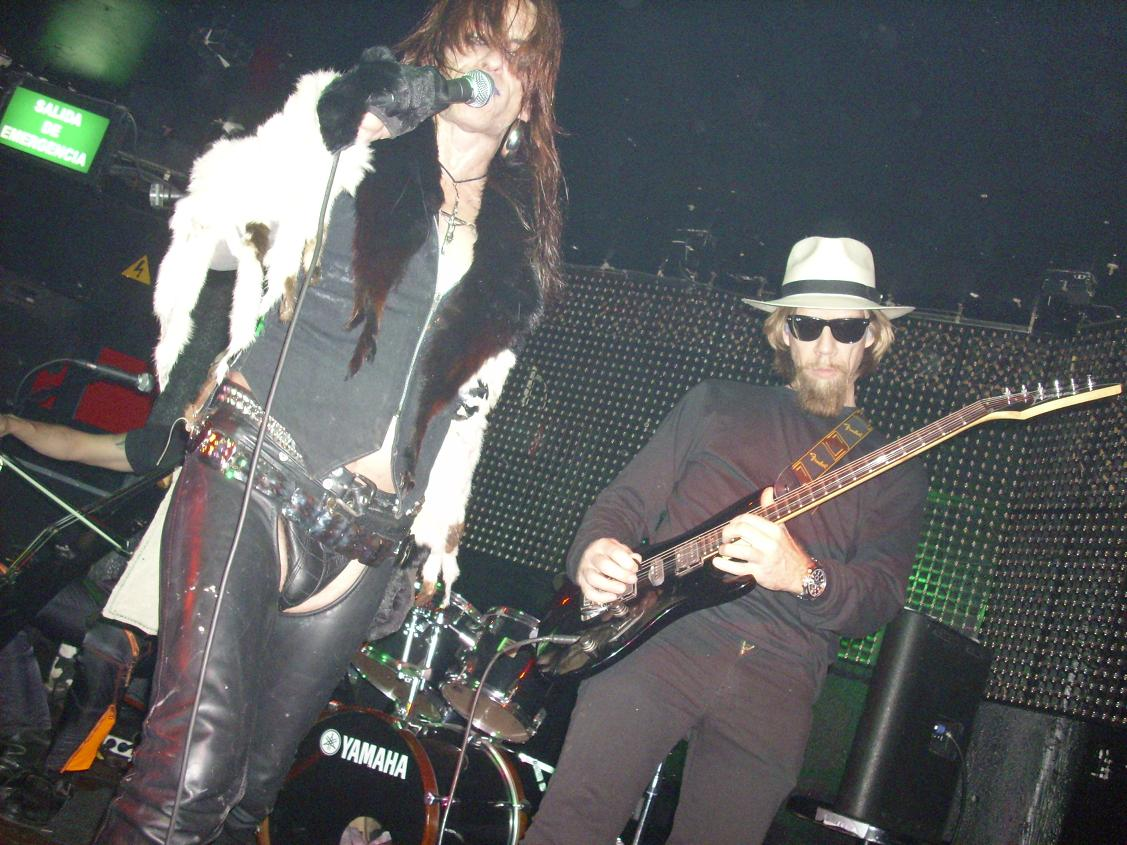 Psychotica @ Sala La Boite Madrid.